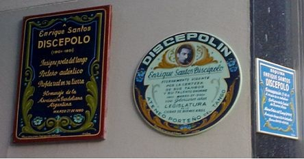 ”Esquina de Santos Discépolo,” ubicada en la calle del mismo nombre y la Avenida Corrientes al 1900. Placas de adhesión al compositor, del Ateneo Porteño del Tango, la Asociación Amigos de la Avenida Corrientes, Sadaic y la Asociación Gardeliana Argentina.